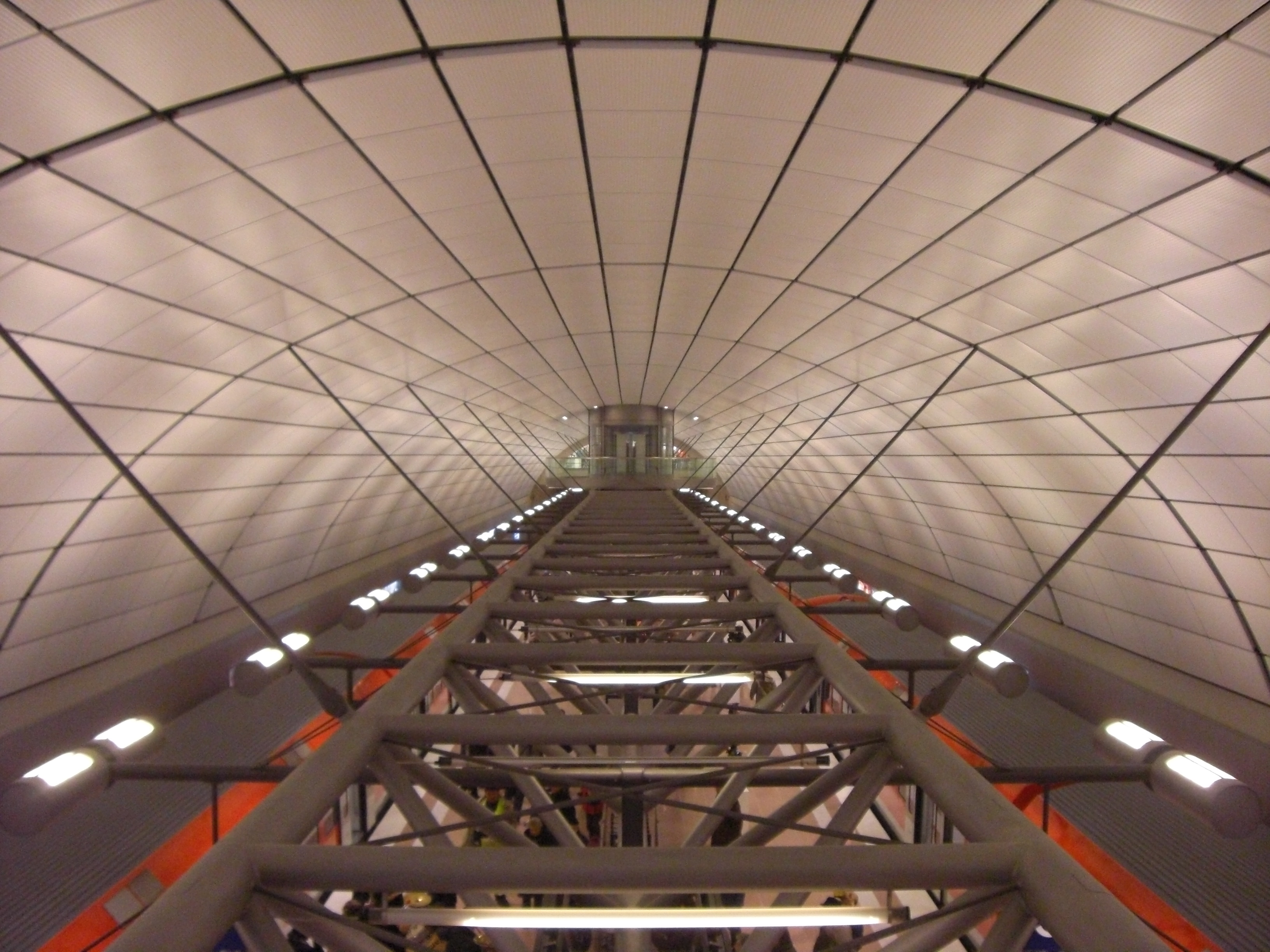 S-Bahnstation "Hamburg Airport (Flughafen)"